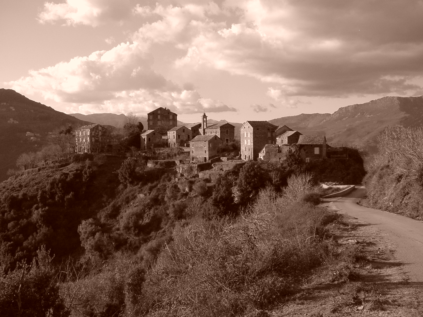 Vue prise vers le NW depuis la RD 10b